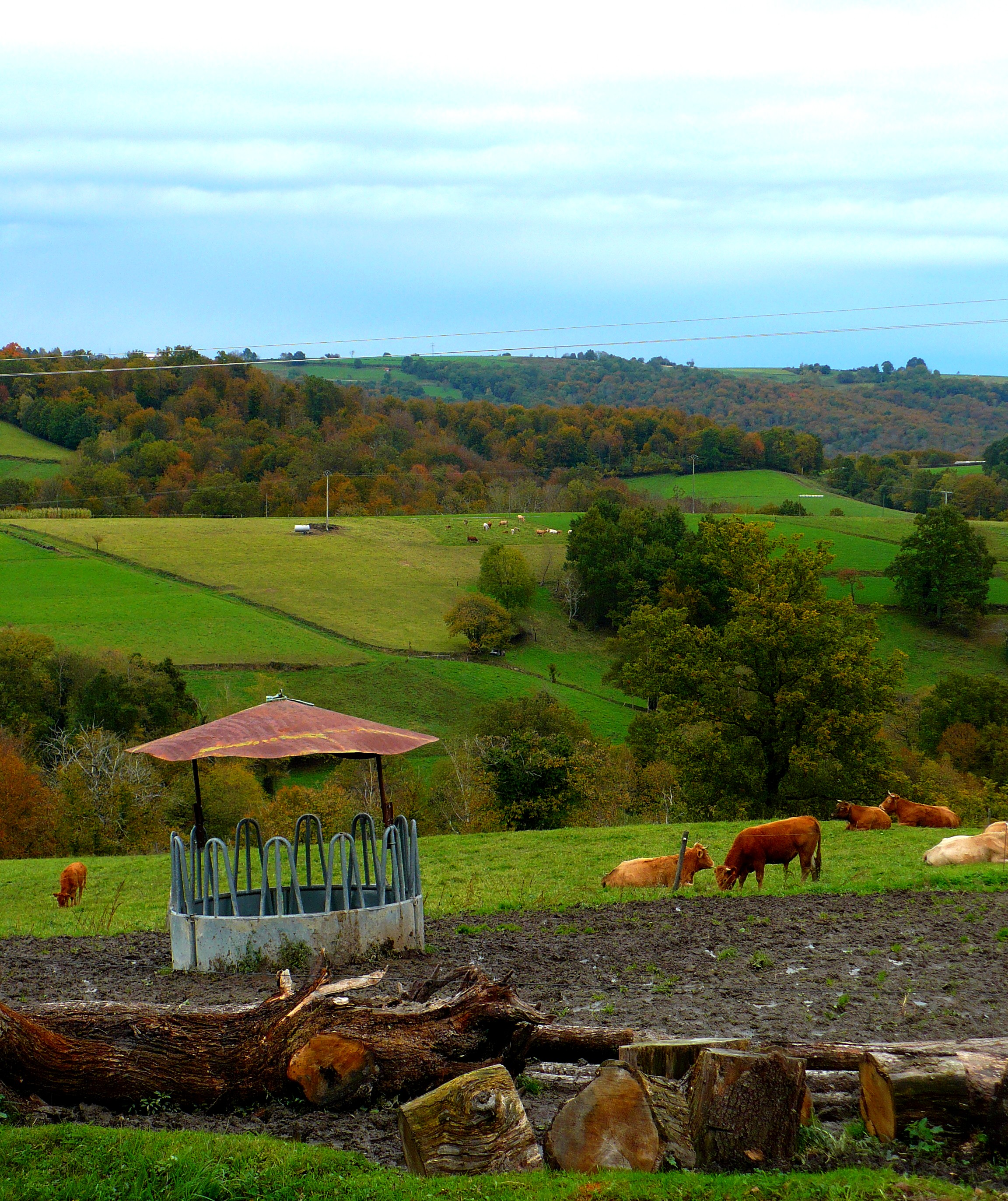 Paysage des Baronnies des Pyrénées, Bettes, France